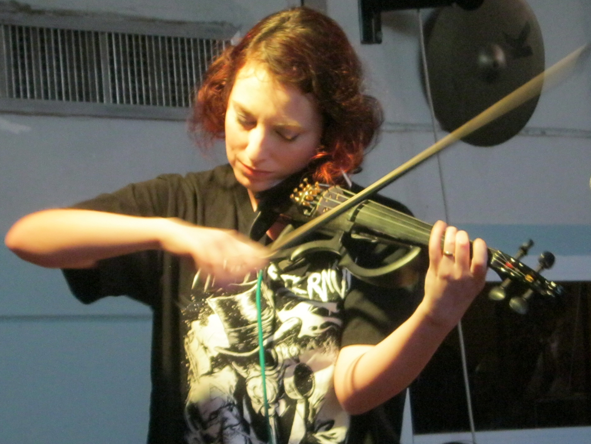 Evelyn Shor (from Fatum Aeternum), 2016